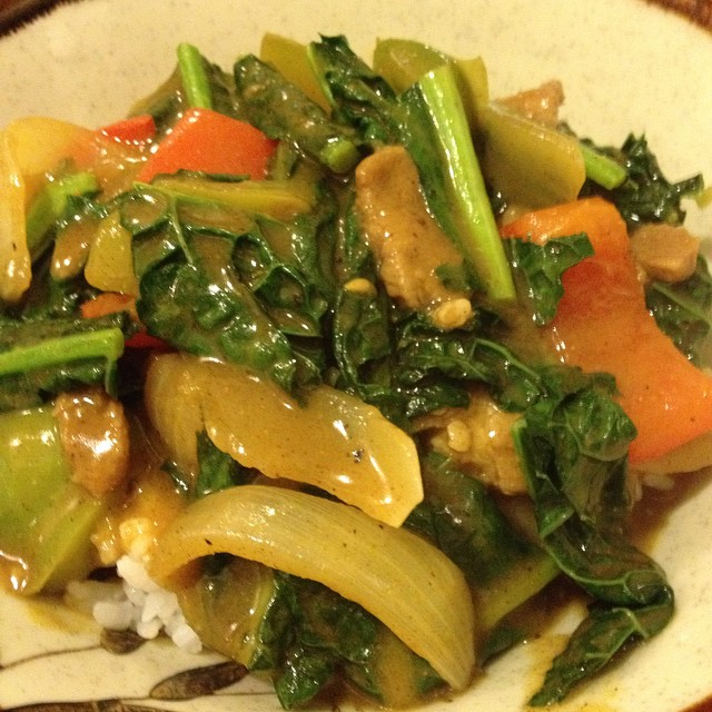 中華丼カレー風、ケール入り Chinese style curry with kale over rice